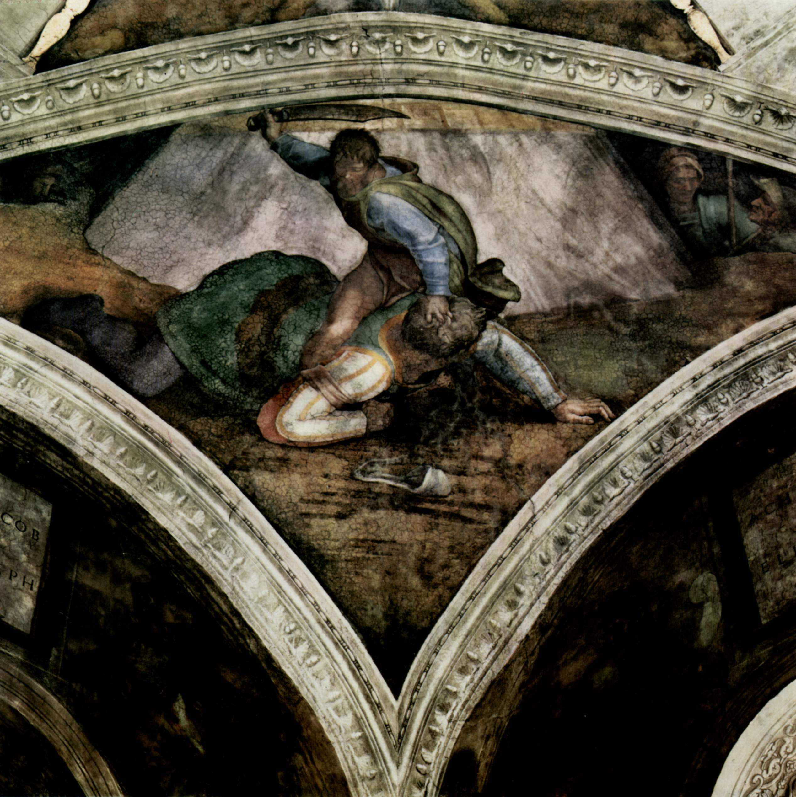 Deckenfresko zur Schöpfungsgeschichte in der Sixtinischen Kapelle, Szene in Lünette